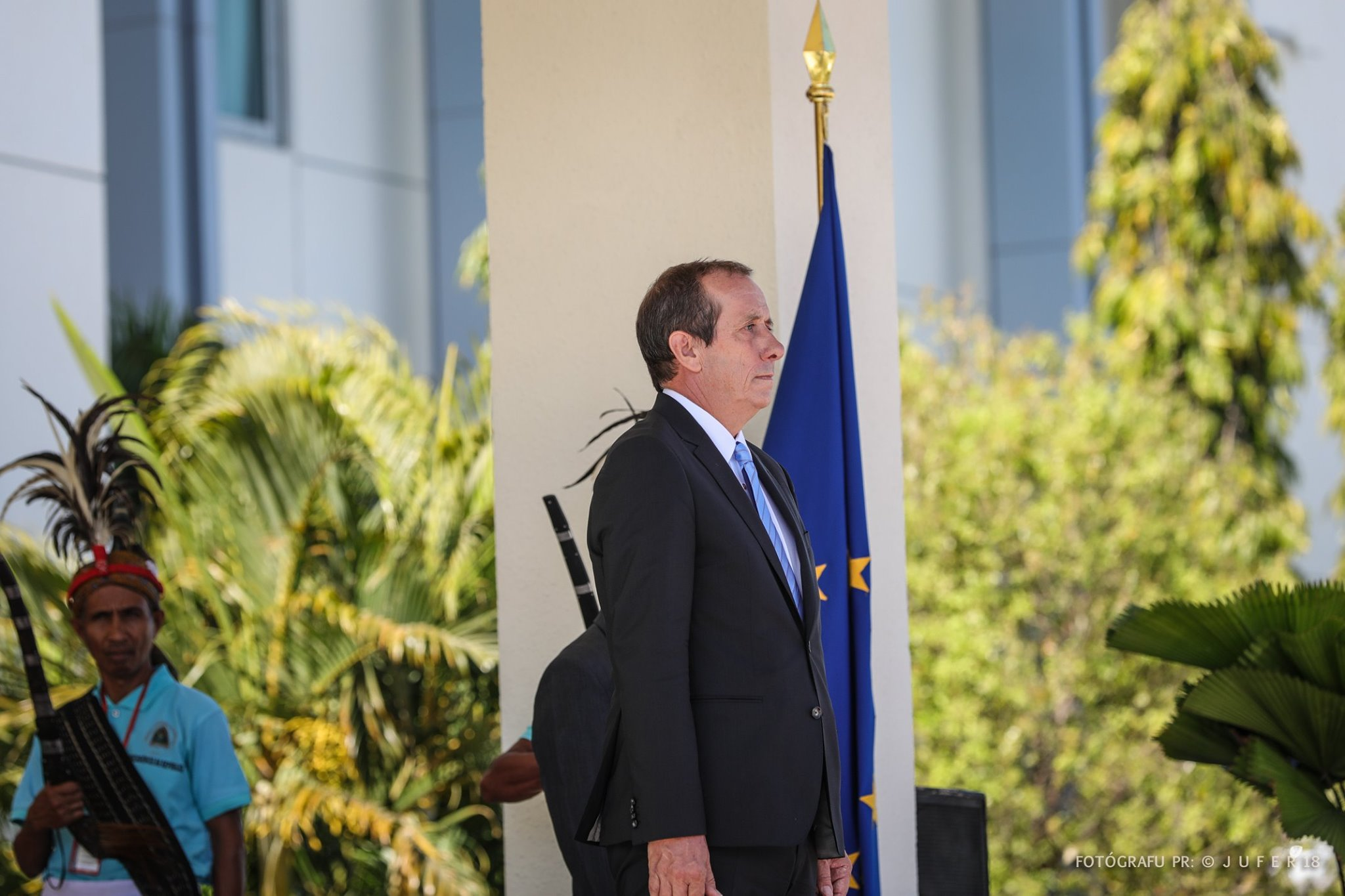 Andrew Jacobs übergibt seine Akkreditierung als Botschafter der Europäischen Union an Osttimors Staatspräsident Francisco Guterres.